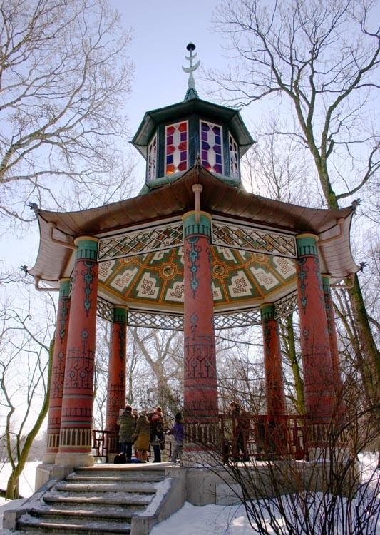 Chinese gazebo in Wilanów Park.